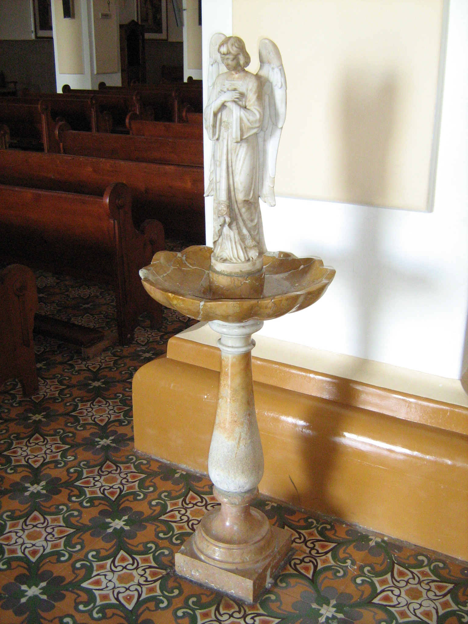 Pila de Agua Bendita de la Basílica de Yarumal, Antioquia, Colombia.